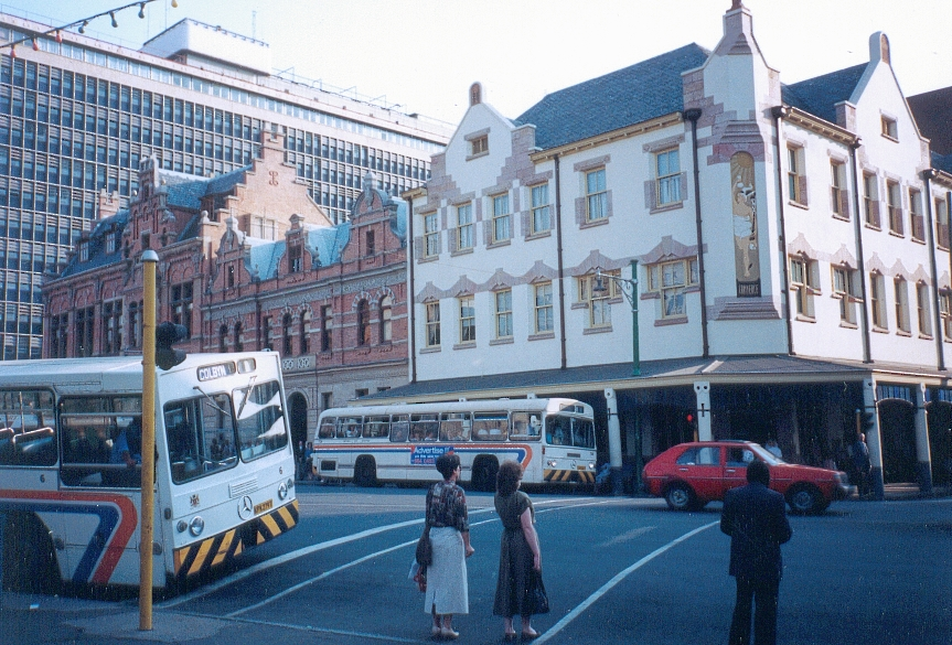 FC Georgio 1991